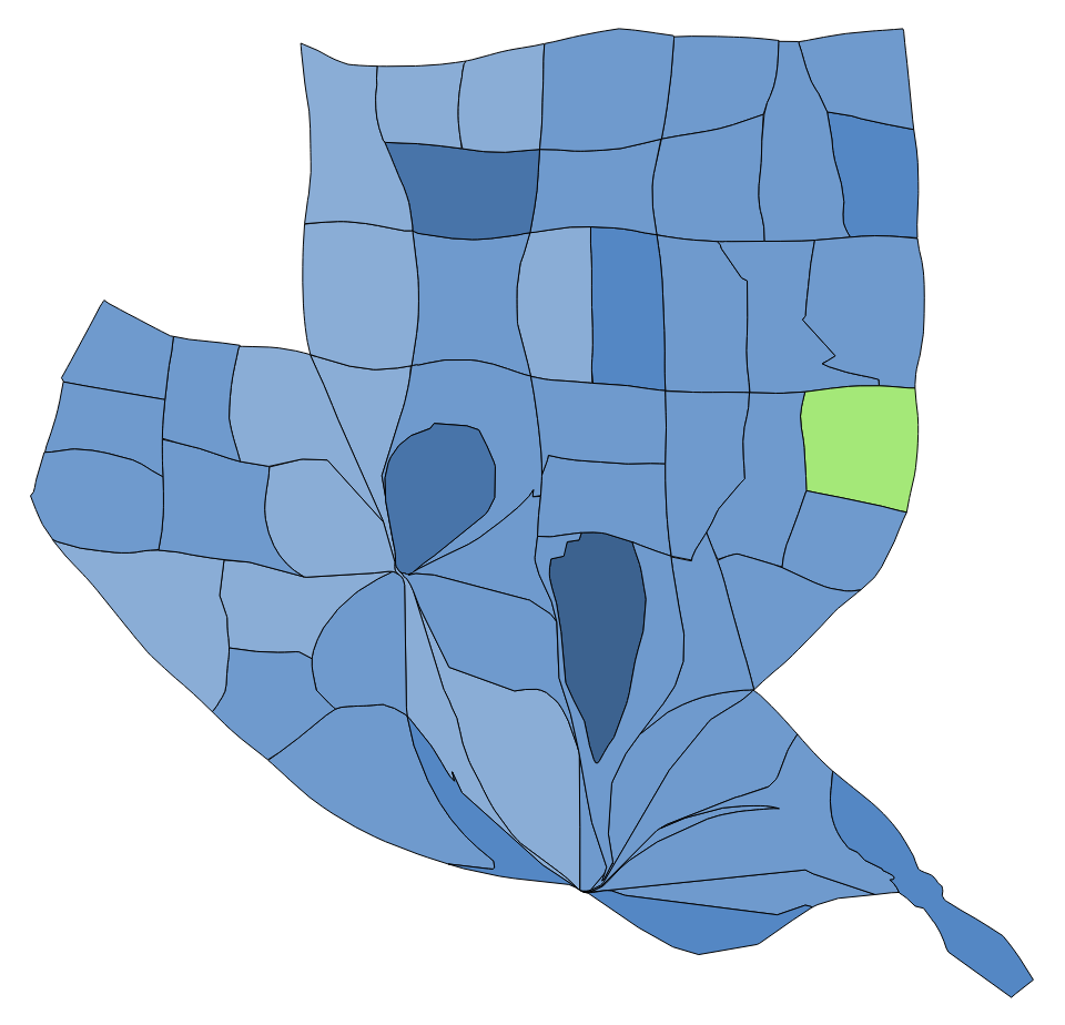 顏色對照表